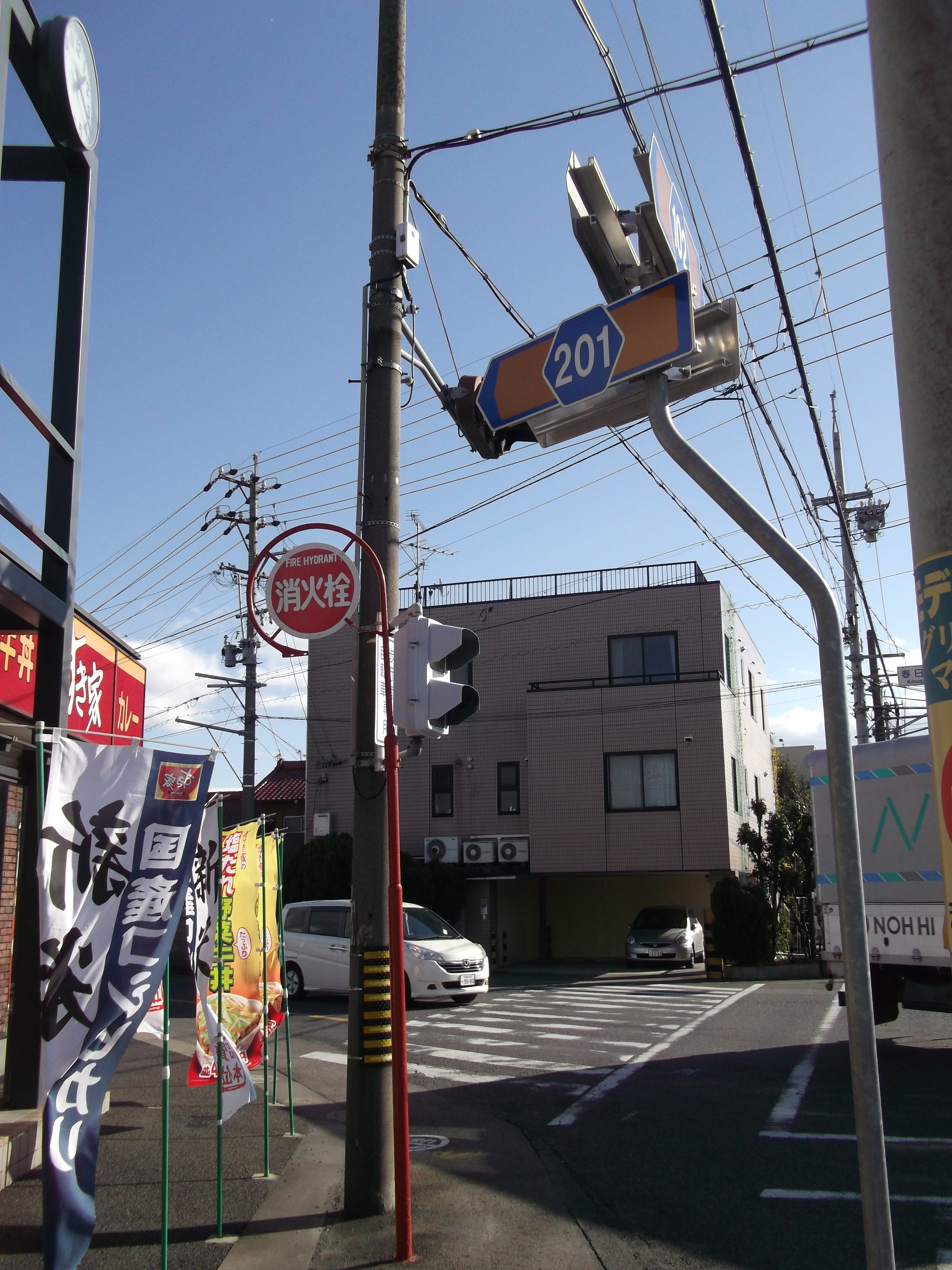 愛知県小牧市の春日寺交差点の愛知県道201号南外山勝川停車場線の実質的な始点